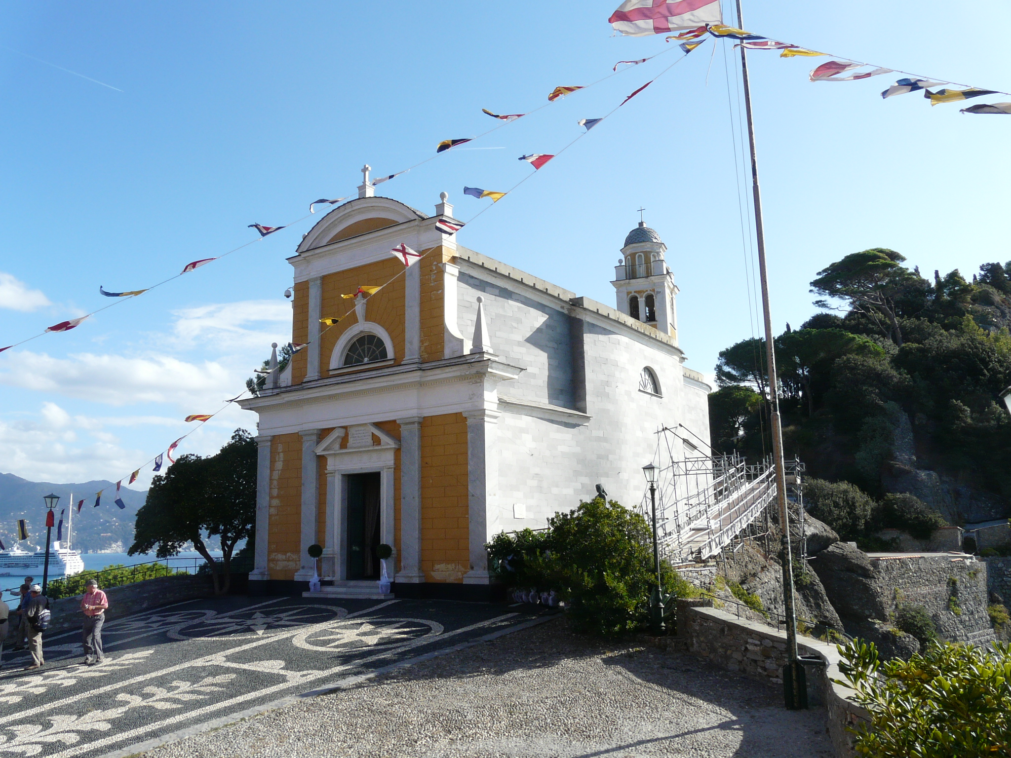 Chiesa di San Giorgio, Portofino, Liguria, Italia